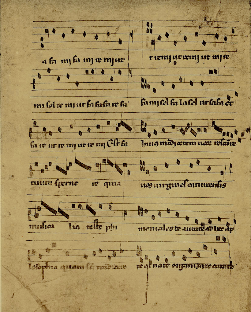 Codex La Huelgas, f° 154v : le solfège à deux voix fa fa mi fa mi re mi. Premier connu.